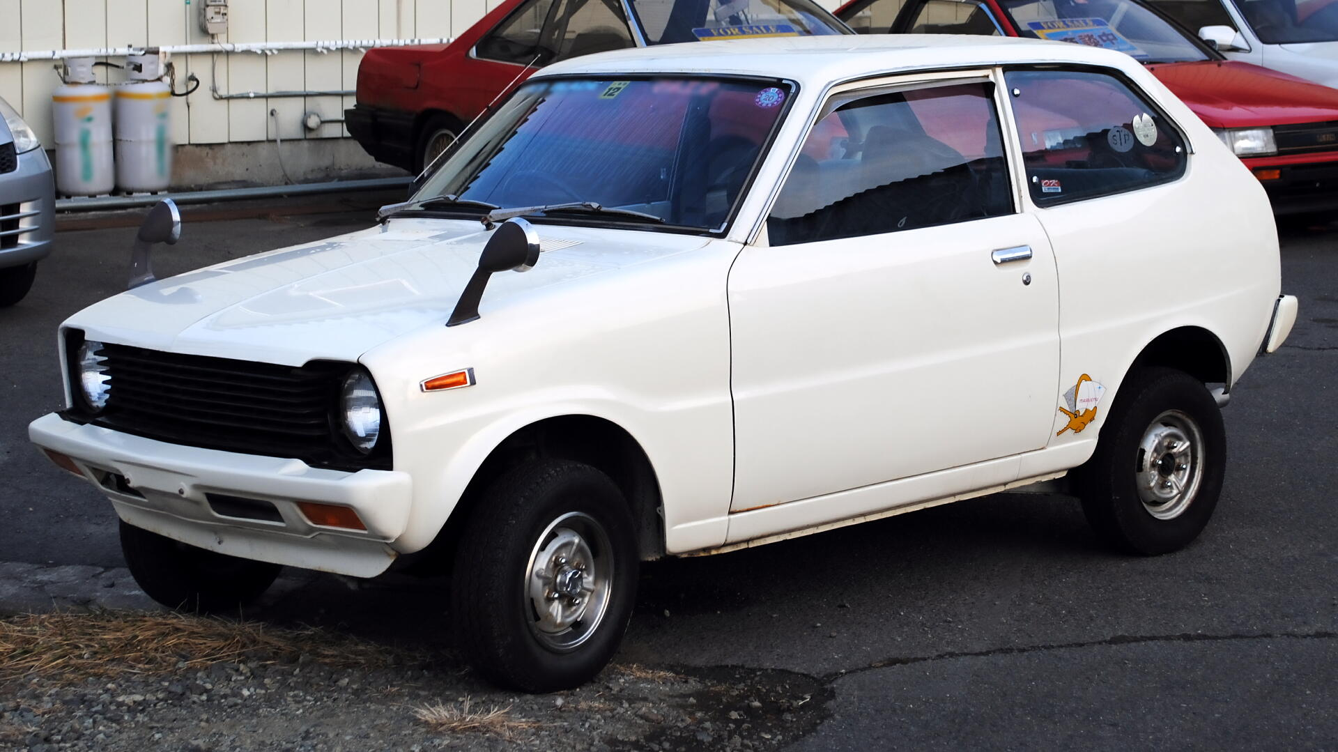 三菱・ミニカ（4代目）